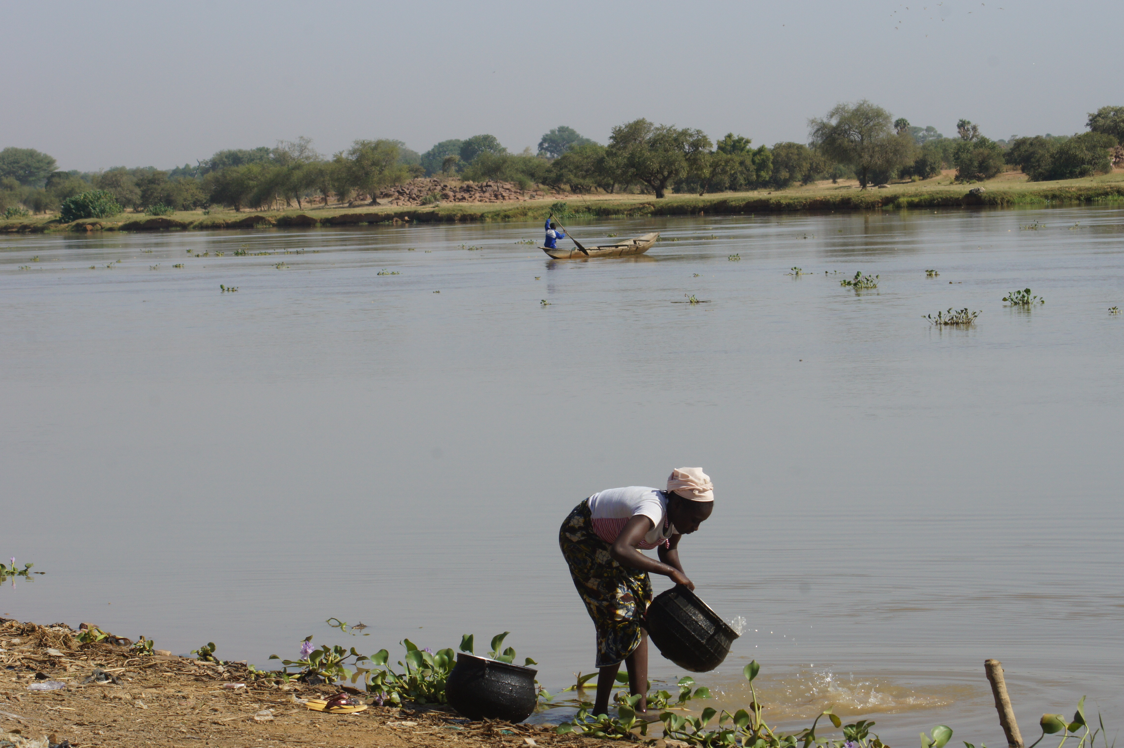 Femmes africaine effectuant des tâches ménagères, en brousse This is an image of "African people at work" from Niger